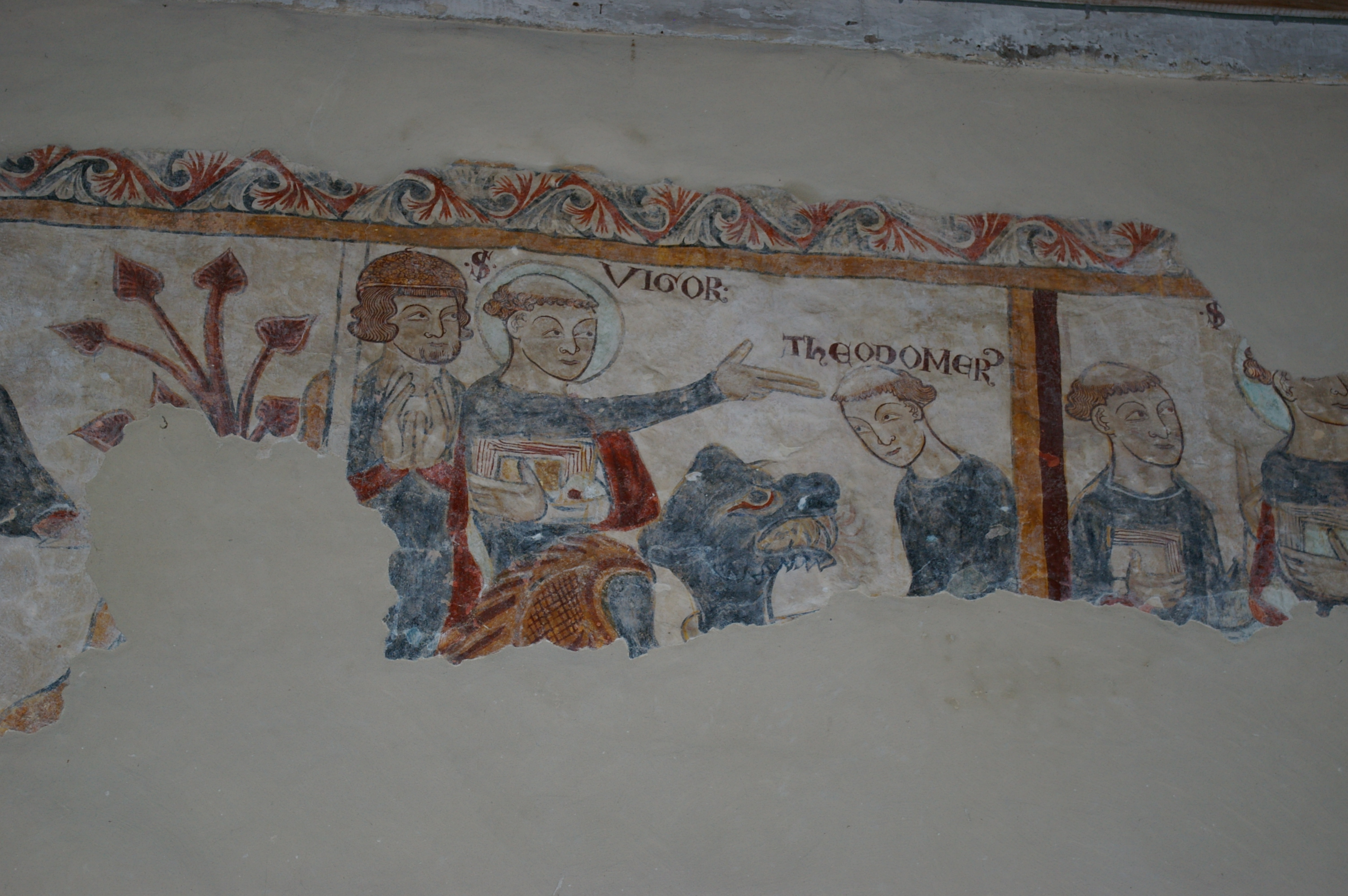 Fresque 3 Eglise st Vigor de Neau